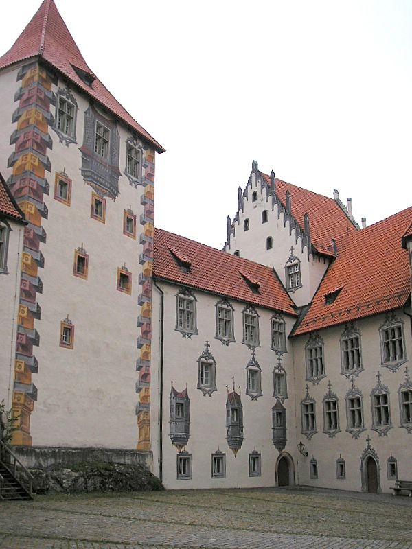 Hohes Schloss Füssen (Allgäu). Bergfried und "Storchenturm".